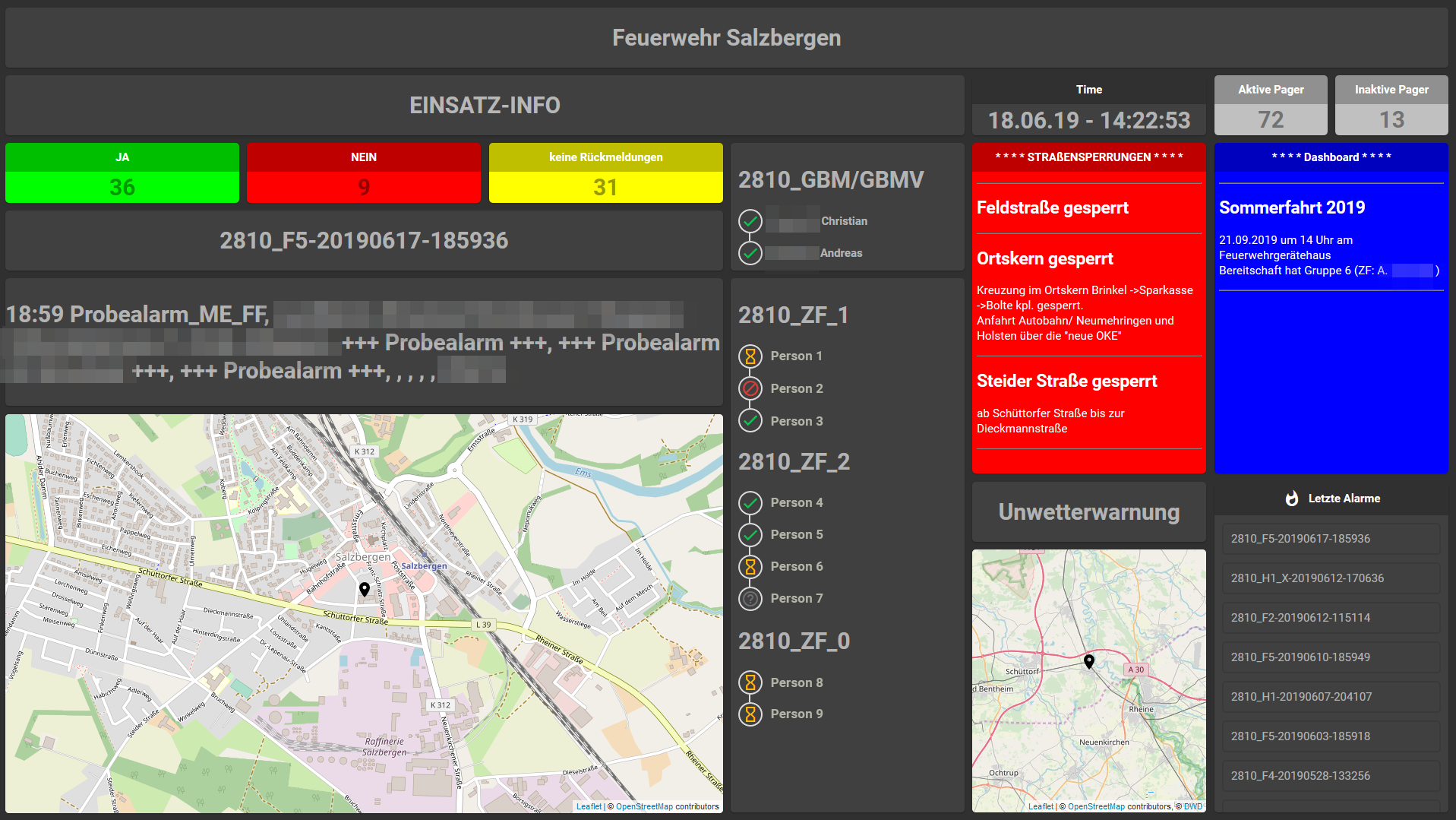 Das Bild zeigt einen modernen Alarmmonitor der SaaS-Lösung GroupAlarm für BOS.